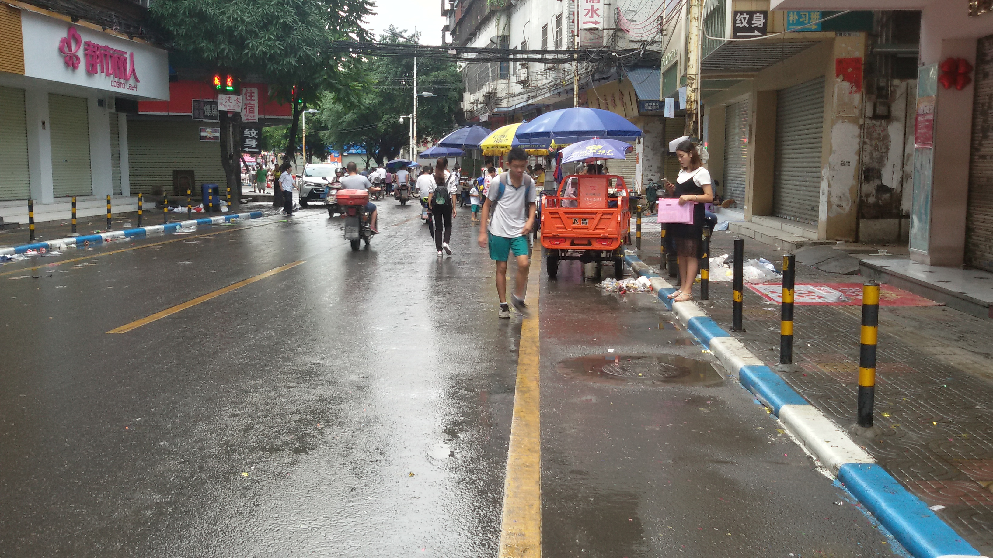 粵語: 白雲區太和中學嘅校服（短衫+短褲）